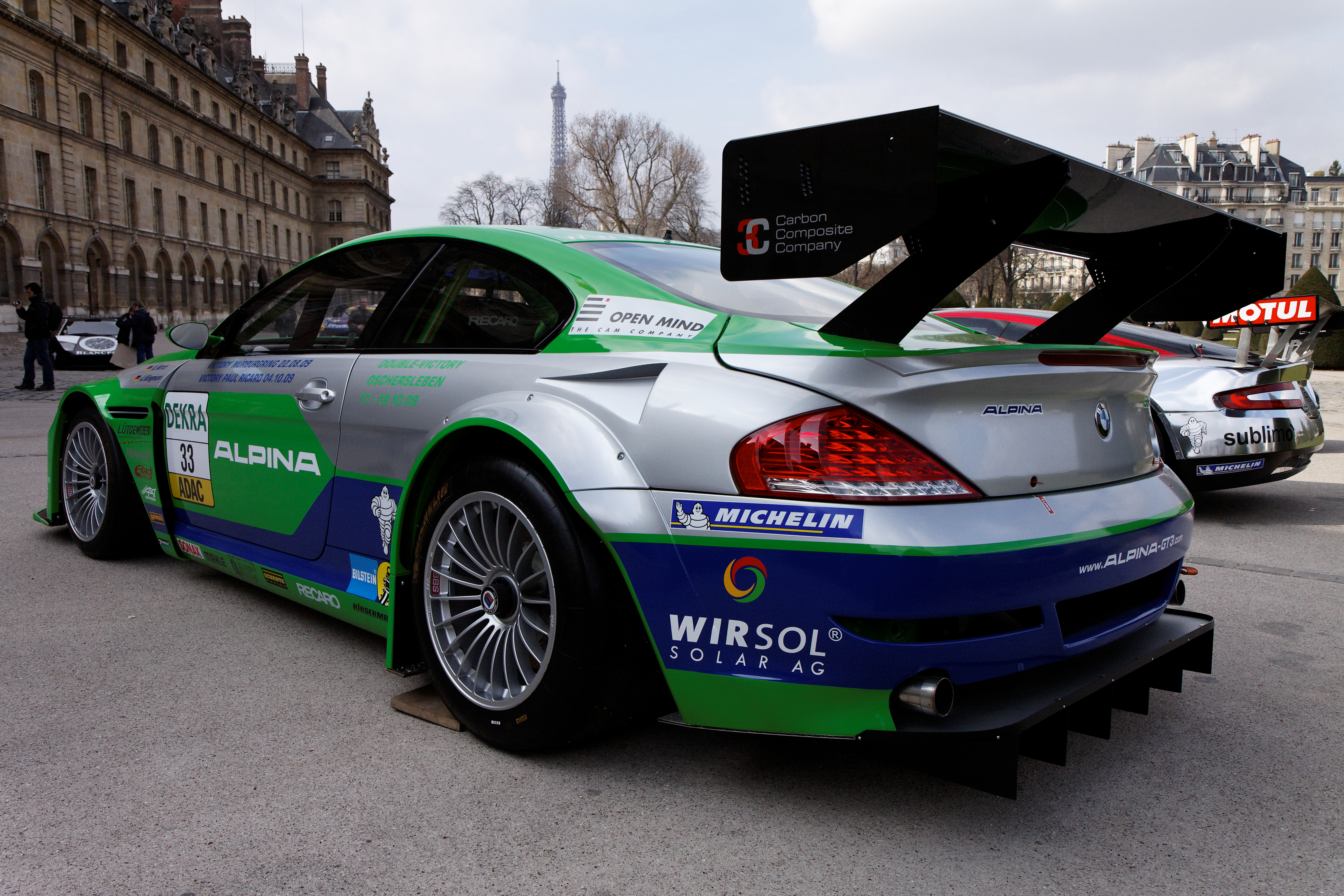 Photographie prise lors de la présentation du Blancpain Endurance series aux Invalides à Paris en mars 2011.